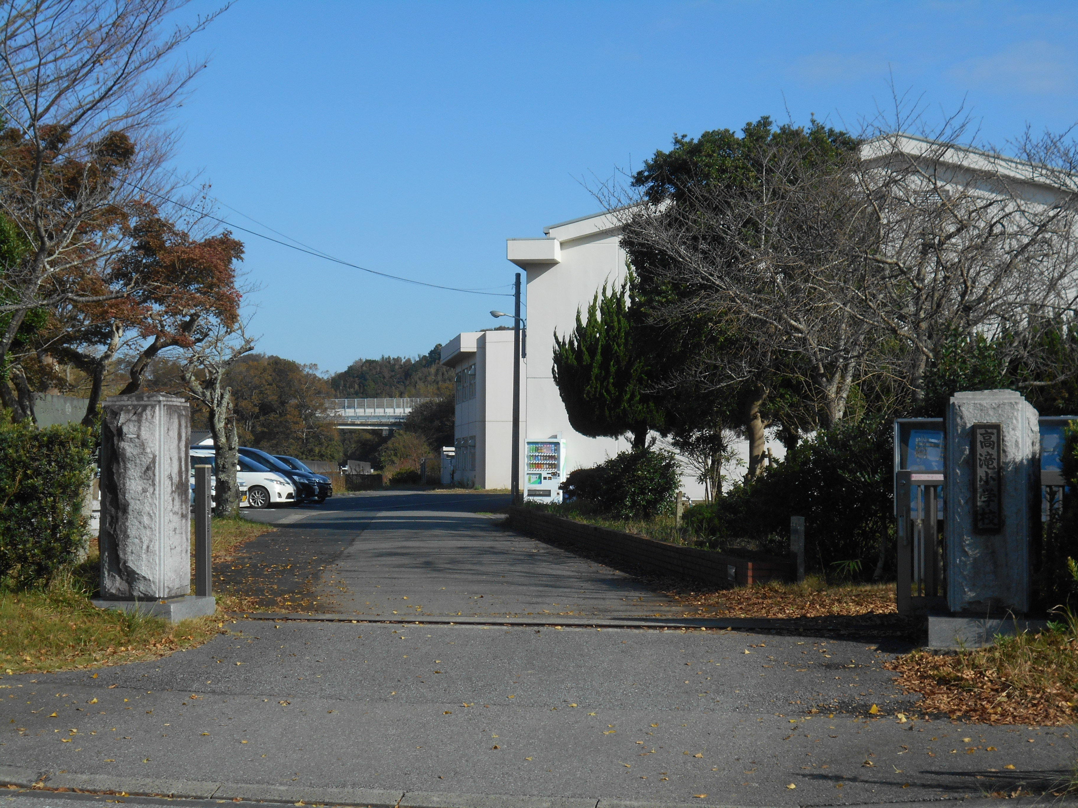 市原市立高滝小学校